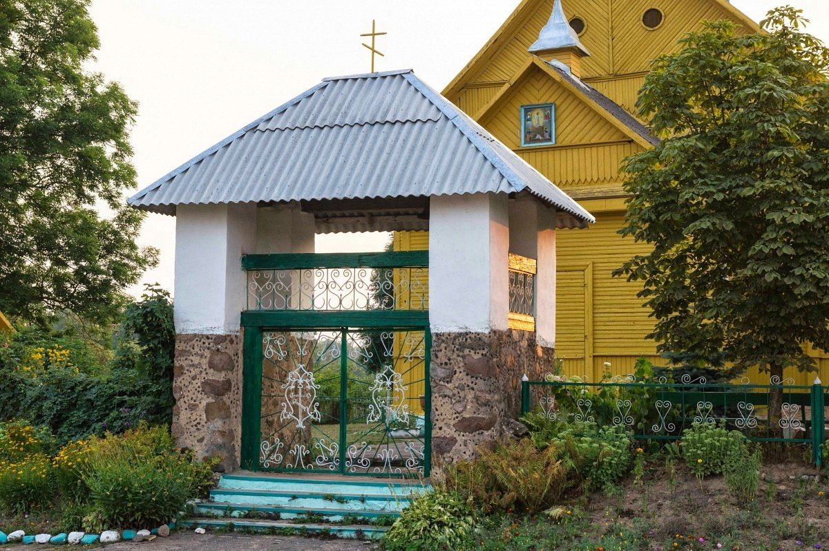 Верхняе. Спаса-Праабражэнская царква. Брама